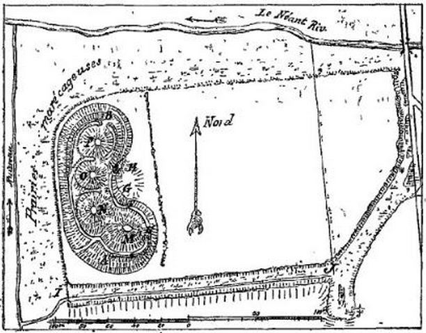 Dessin du site du théâtre publié en 1891